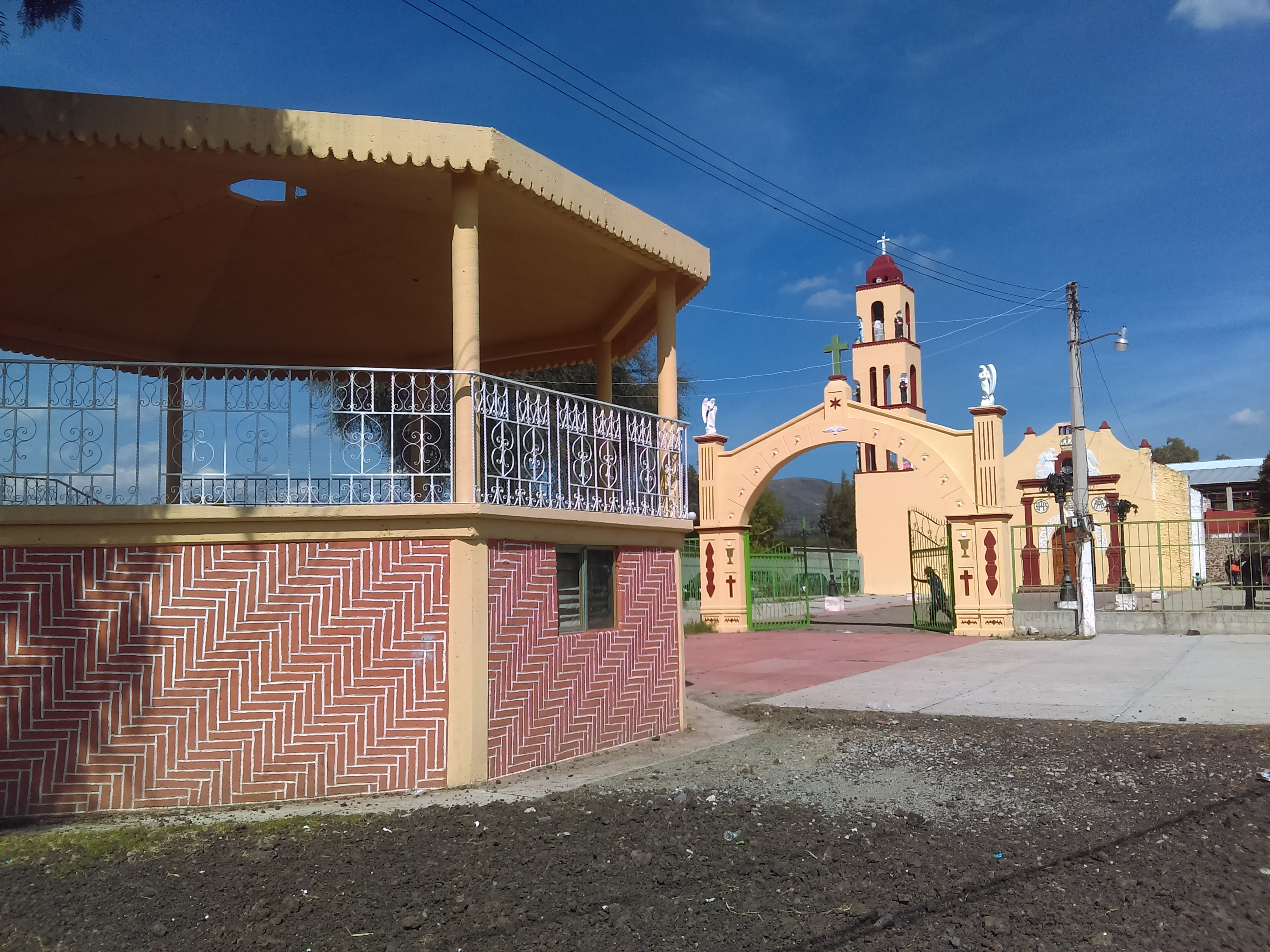 Dajiedhi